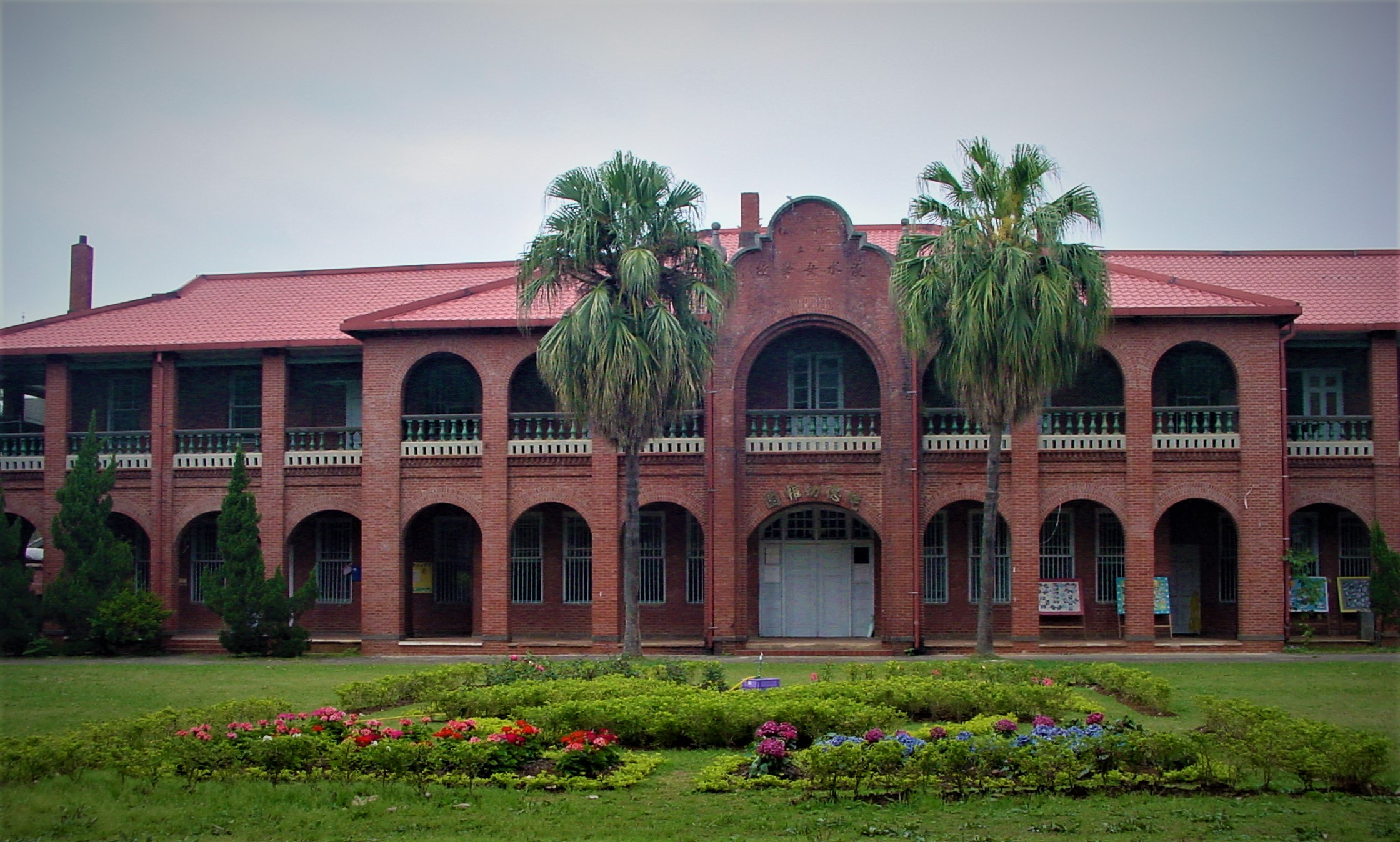 中文（台灣）: 新北市淡水女學堂